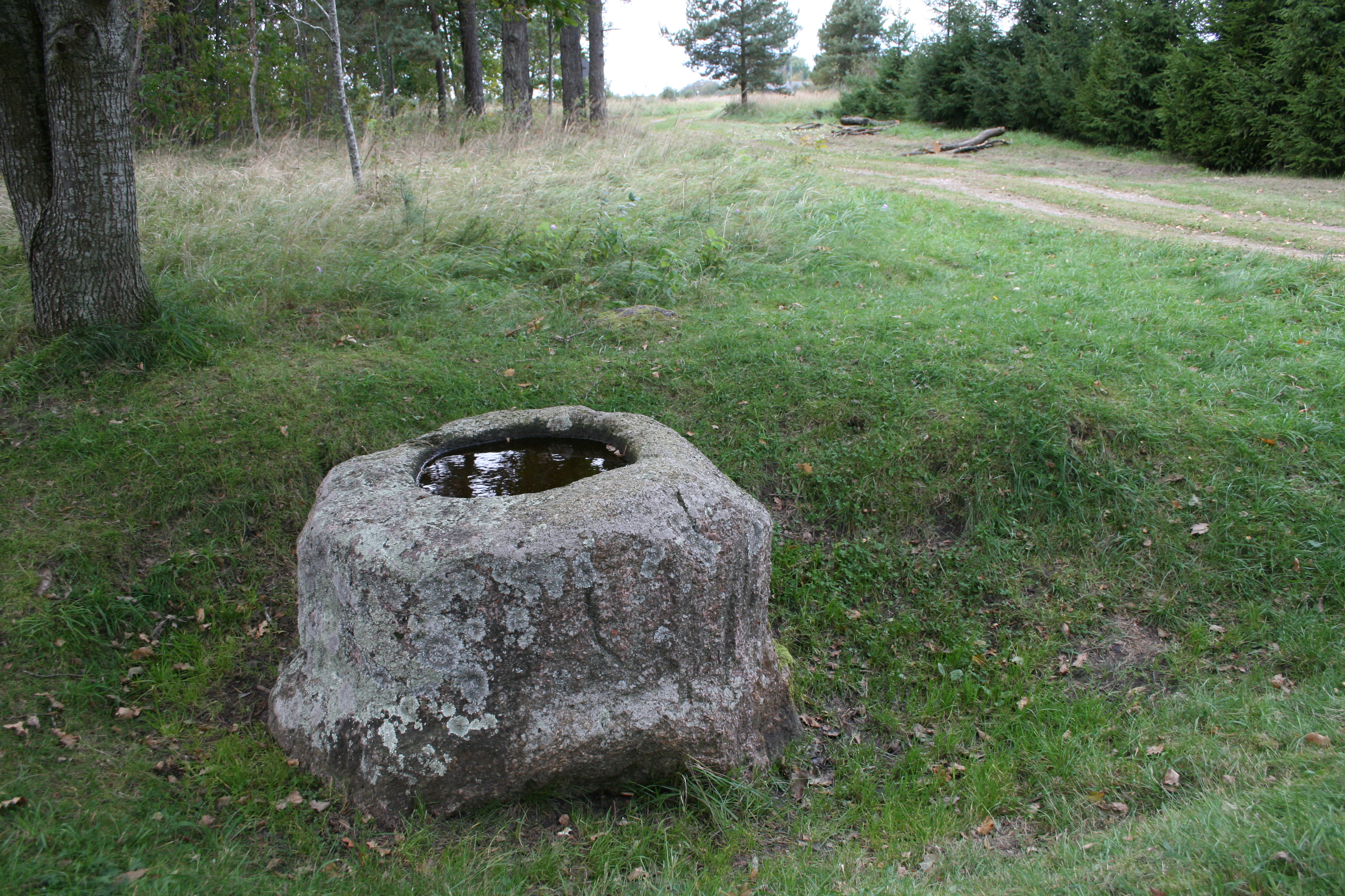 Piņņu Upurakmens - kulta vieta, Sakas pagasts